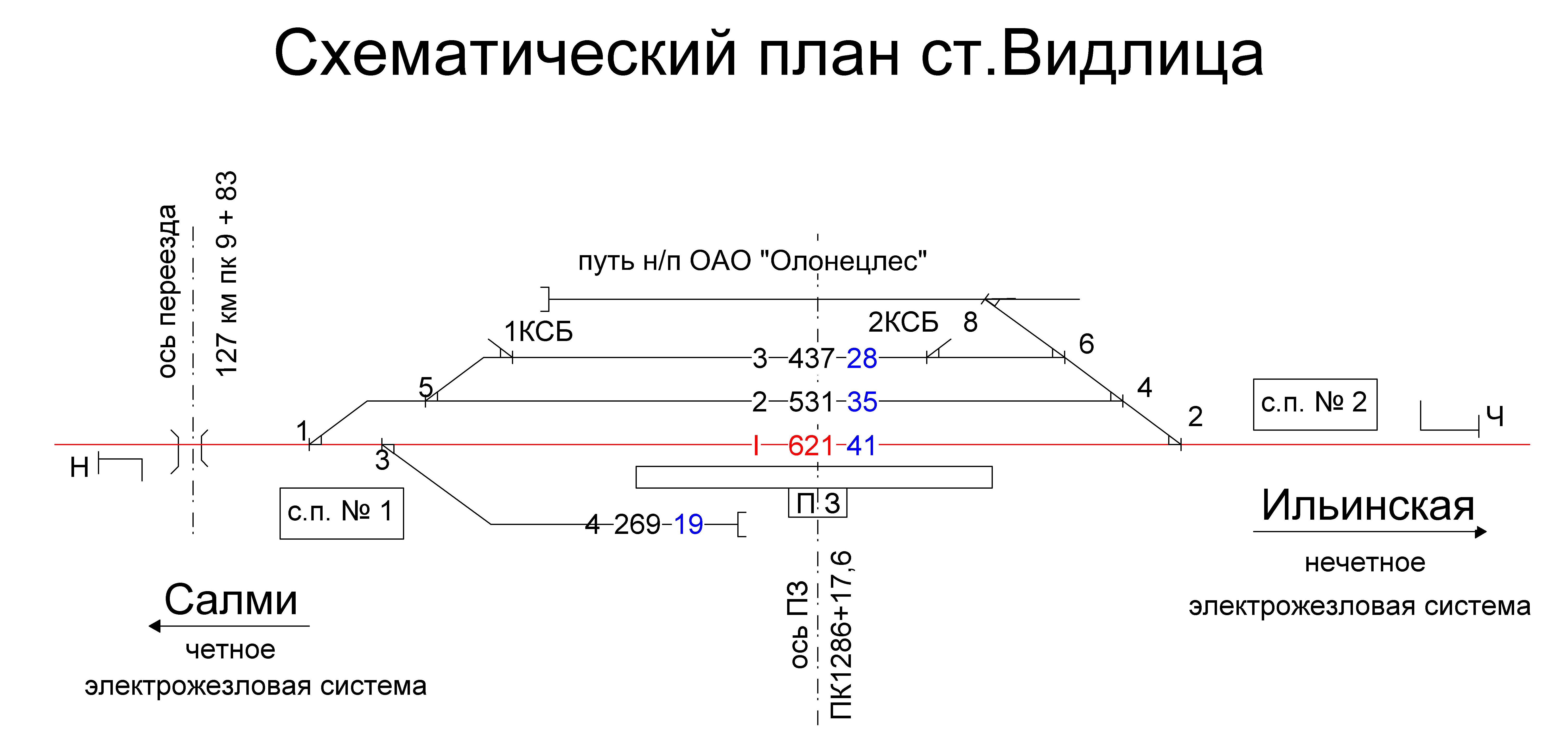 Схема путевого развития ст. Видлица.